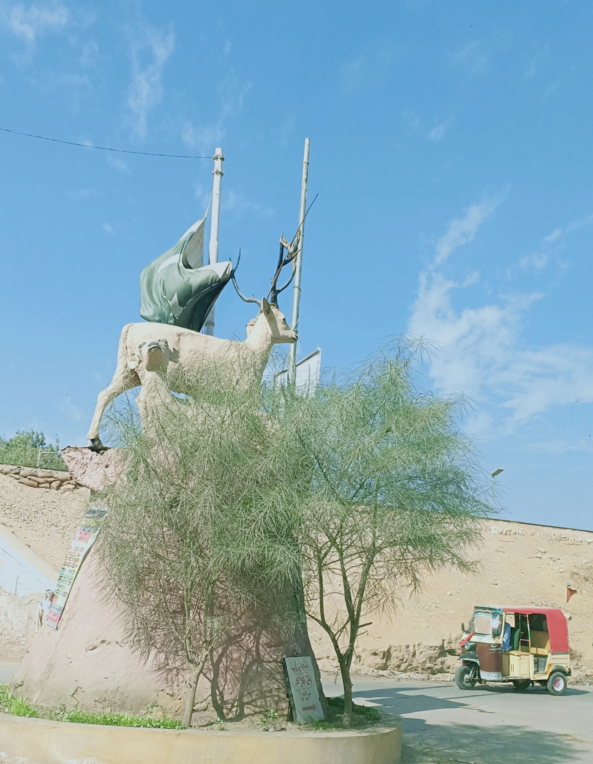 سنڌي: ڪوٽڙي ۾ ريلوي اسٽيشن طرف ھڪ چوڪ